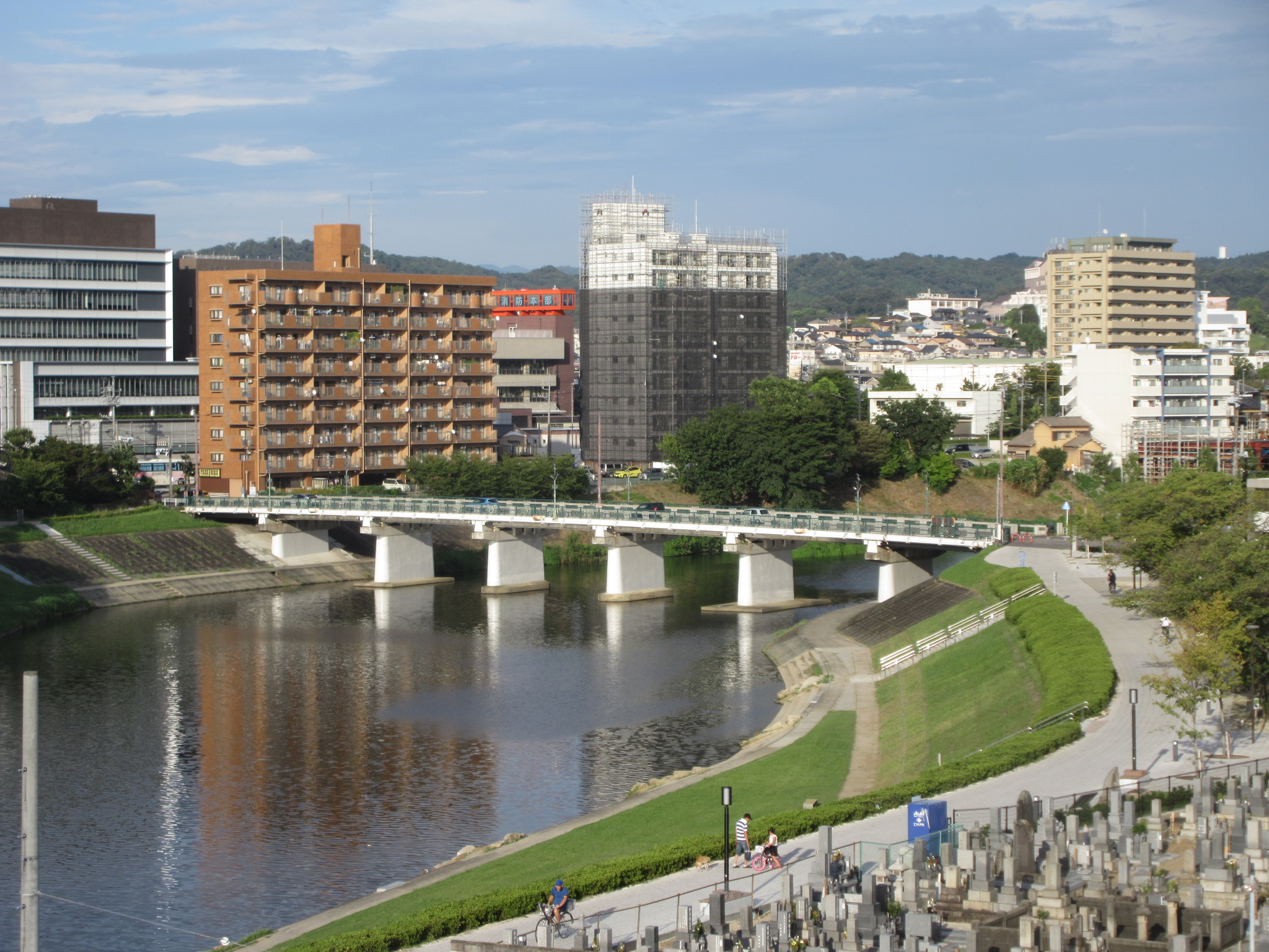 乙川にかかる吹矢橋